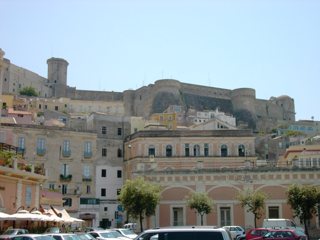 Luogo= Gaeta, Lazio, Italia. - Fotografo=Luigi Versaggi - url_fotografo= - url_foto=